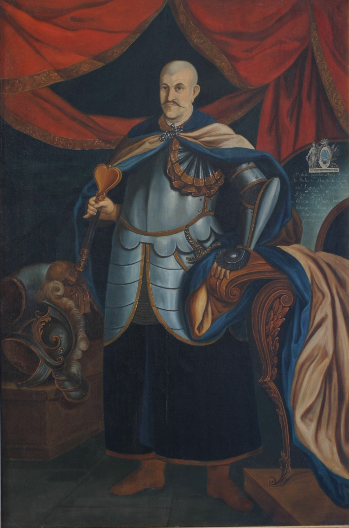 Беларуская (тарашкевіца): Партрэт Крыштапа Тэабальда Завішы (Kryštap Teabald Zaviša) гербу «Лебедзь» (? — 1763), дзяржаўнага дзеяча Вялікага Княства Літоўскага, старосты старадубскага.